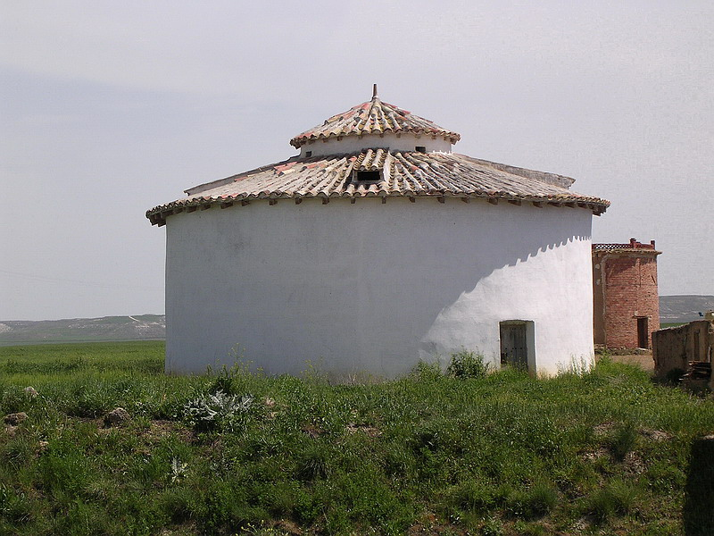 Palomar en Tierra de Campos.Fotografía casera de es::es:Usuario:Rapomon cedida a la Wikipedia bajo la siguiente licencia: Categoría:España (imagen)